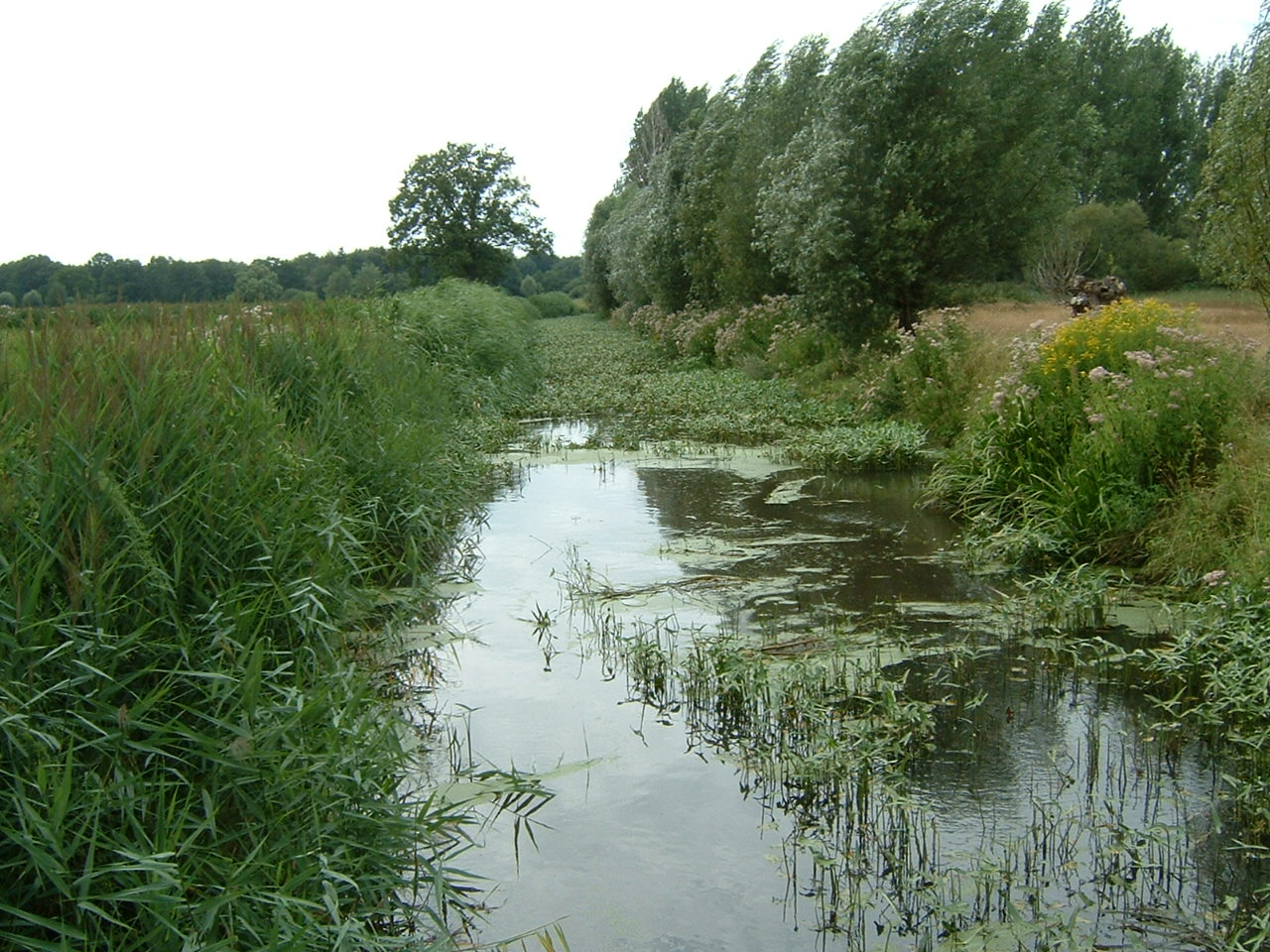 Foto R.J.Casimir